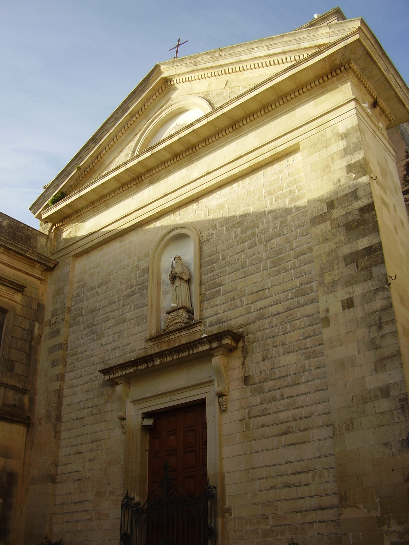 Poggiardo Chiesa San Francesco, Lecce